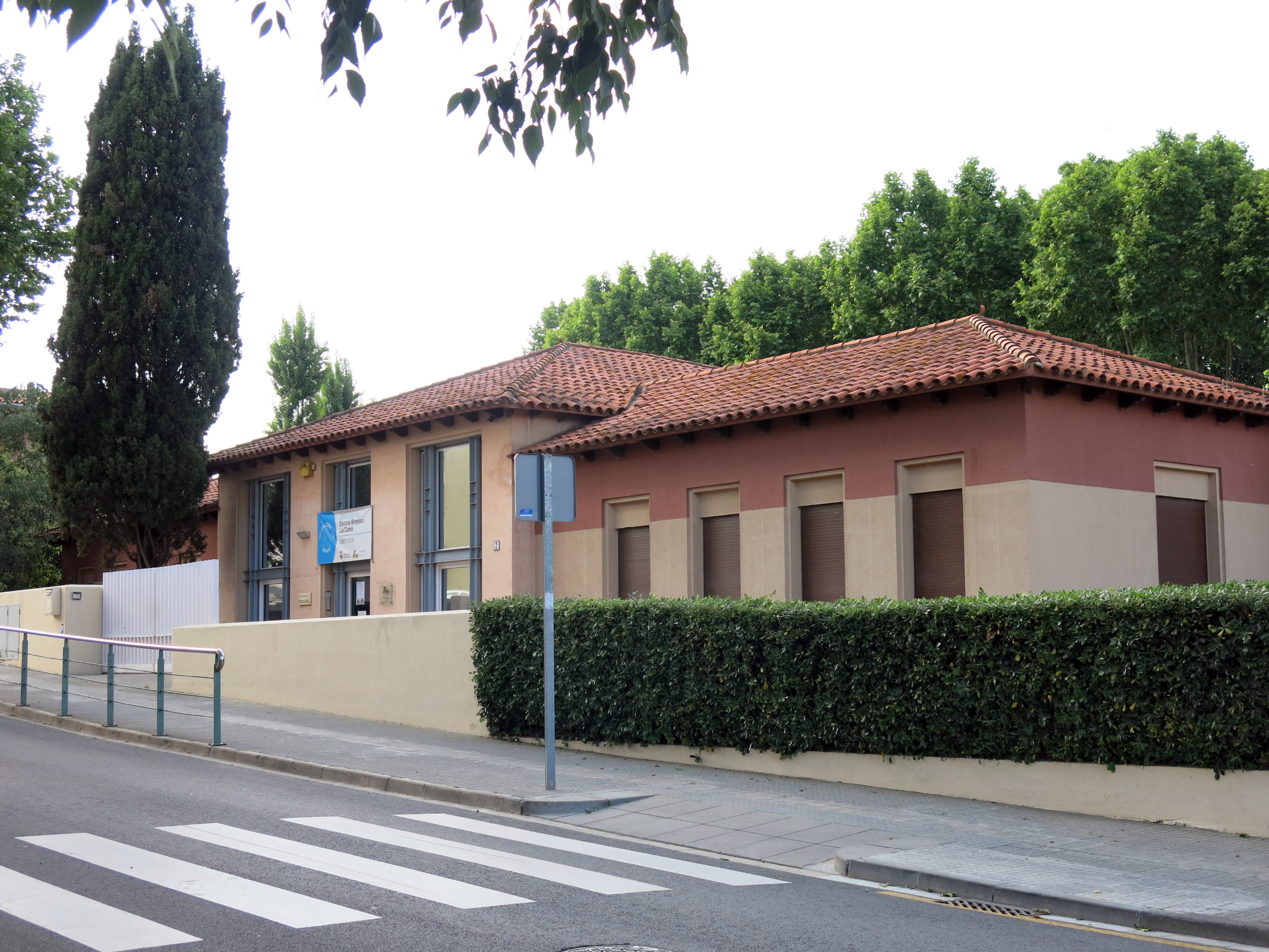 Escola bressol (Parets del Vallès)